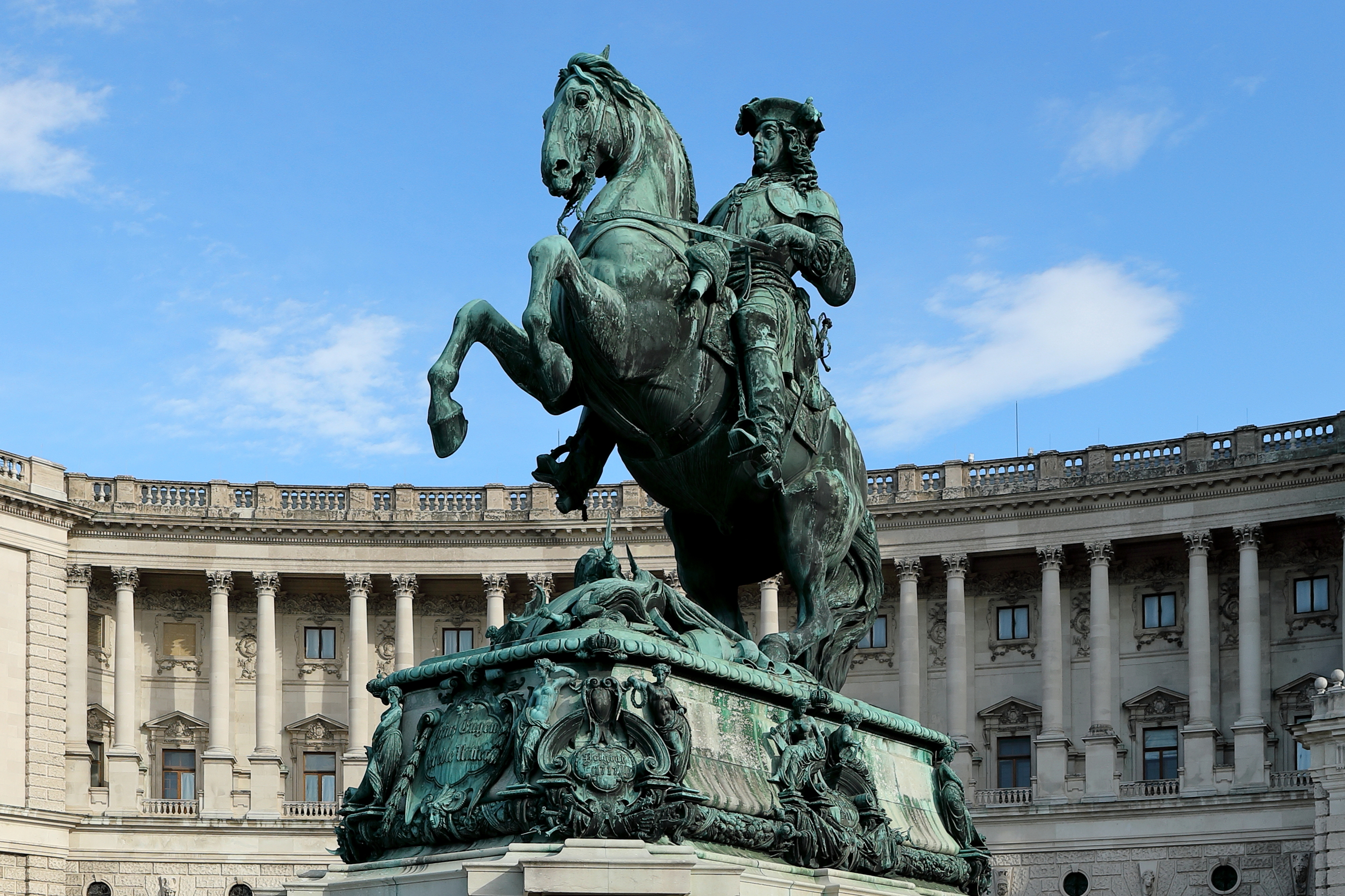 Das Prinz-Eugen-Denkmal am Heldenplatz im 1. Wiener Bezirk Innere Stadt und im Hintergrund die Neue Hofburg.Das bronzene Reiterstandbild auf einem Postament aus geschliffenem und poliertem Untersberger Marmor stellt den Prinz Eugen von Savoyen dar und wurde am 18. Oktober 1865 enthüllt. Den Auftrag dazu erhielt 1860 der Bildhauer Anton Dominik von Fernkorn und nachdem dieser um 1862 erkrankte, erfolgte die Fertigstellung weitgehend von seinem Schüler Franz Pönninger. Die Zeichnung zu den Ornamenten stammt von Eduard van der Nüll und die Steinmetzarbeiten führten Krammer und Josef Budowitz aus.